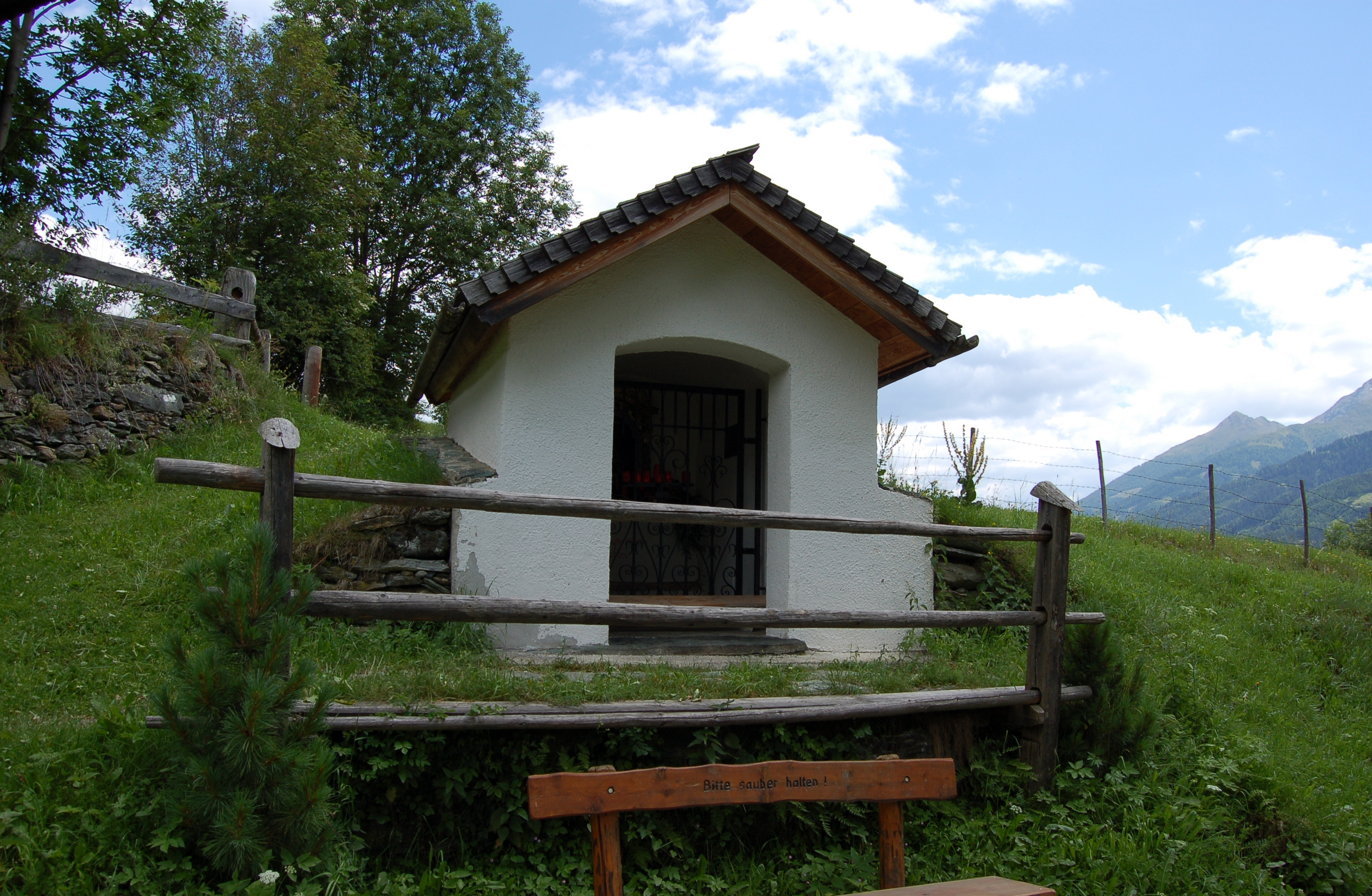 Die denkmalgeschützte Wegkapelle Ketterle am Weg von Obermauern nach Virgen.